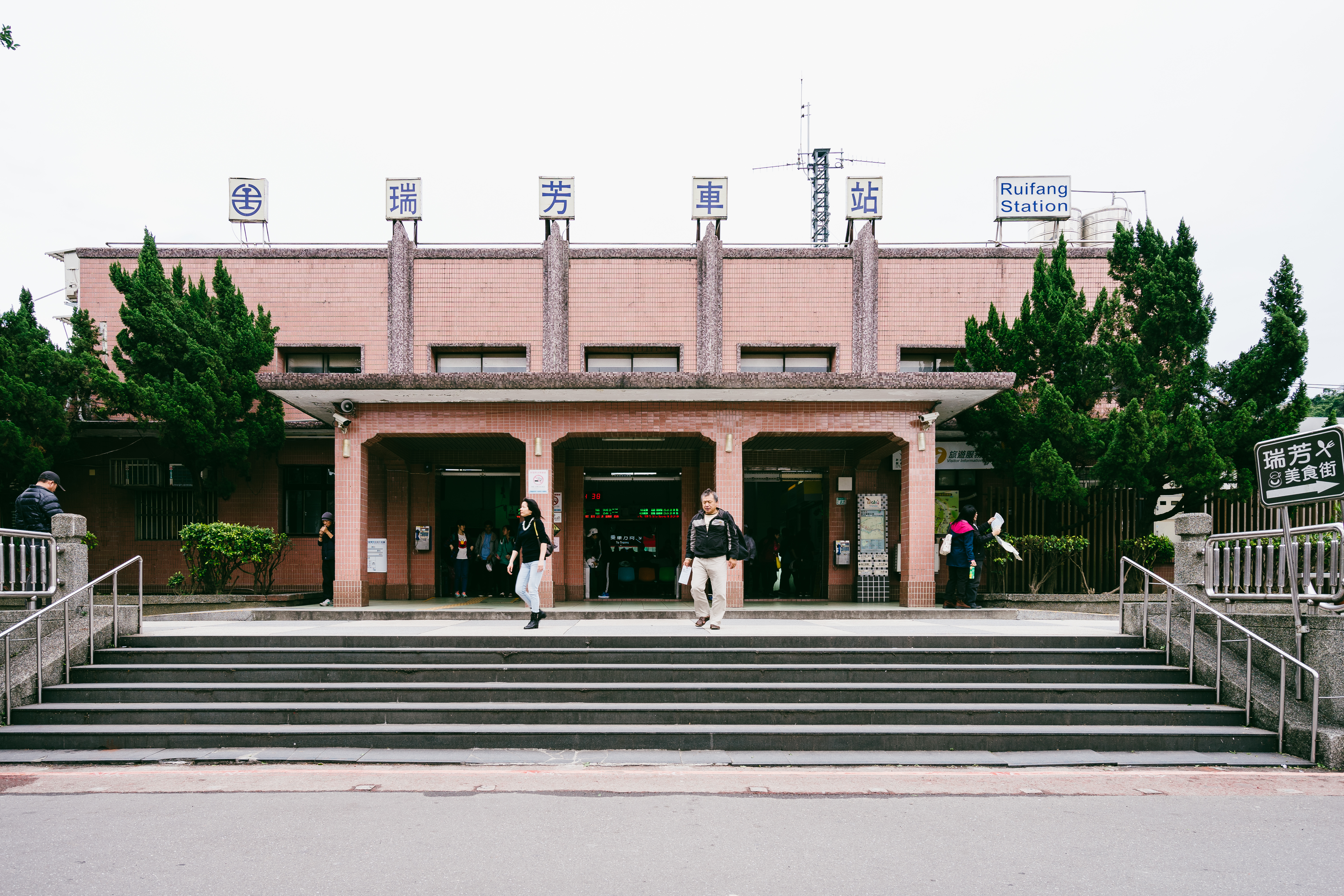 臺灣鐵路管理局瑞芳車站。